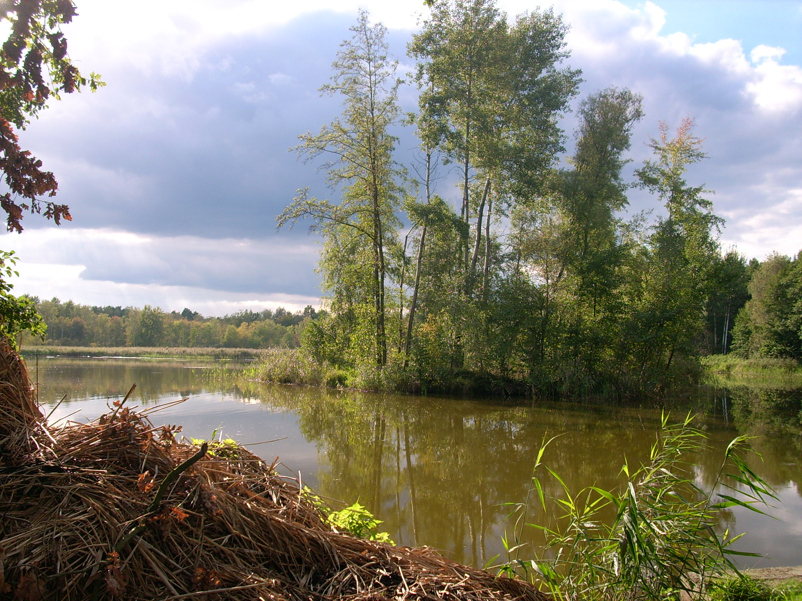 Wusteteich im Dubringer Moor bei Wittichenau